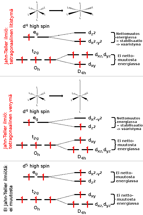 Yllä kuvassa: Jahn-Teller ilmiö havaitaan tetragonaalisena venymänä tai litistymänä oktaedrisissä high-spin d4 komplekseissa elektronien energian nettomuutoksen vuoksi (huomaa pariton elektronien määrä eg-orbitaalilla). Alla kuvassa: Jahn-Teller ilmiötä ei havaita jos energian nettomuutosta ei ole (huomaa parillinen elektronien määrä eg-orbitaalilla).